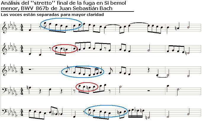 Final de la fuga en Si bemol menor de Juan Sebastián Bach en la que se aprecia un "stretto" que involucra a las cinco voces